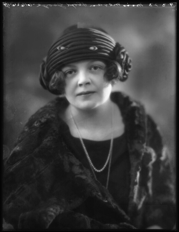 Portrait of Megan Lloyd George